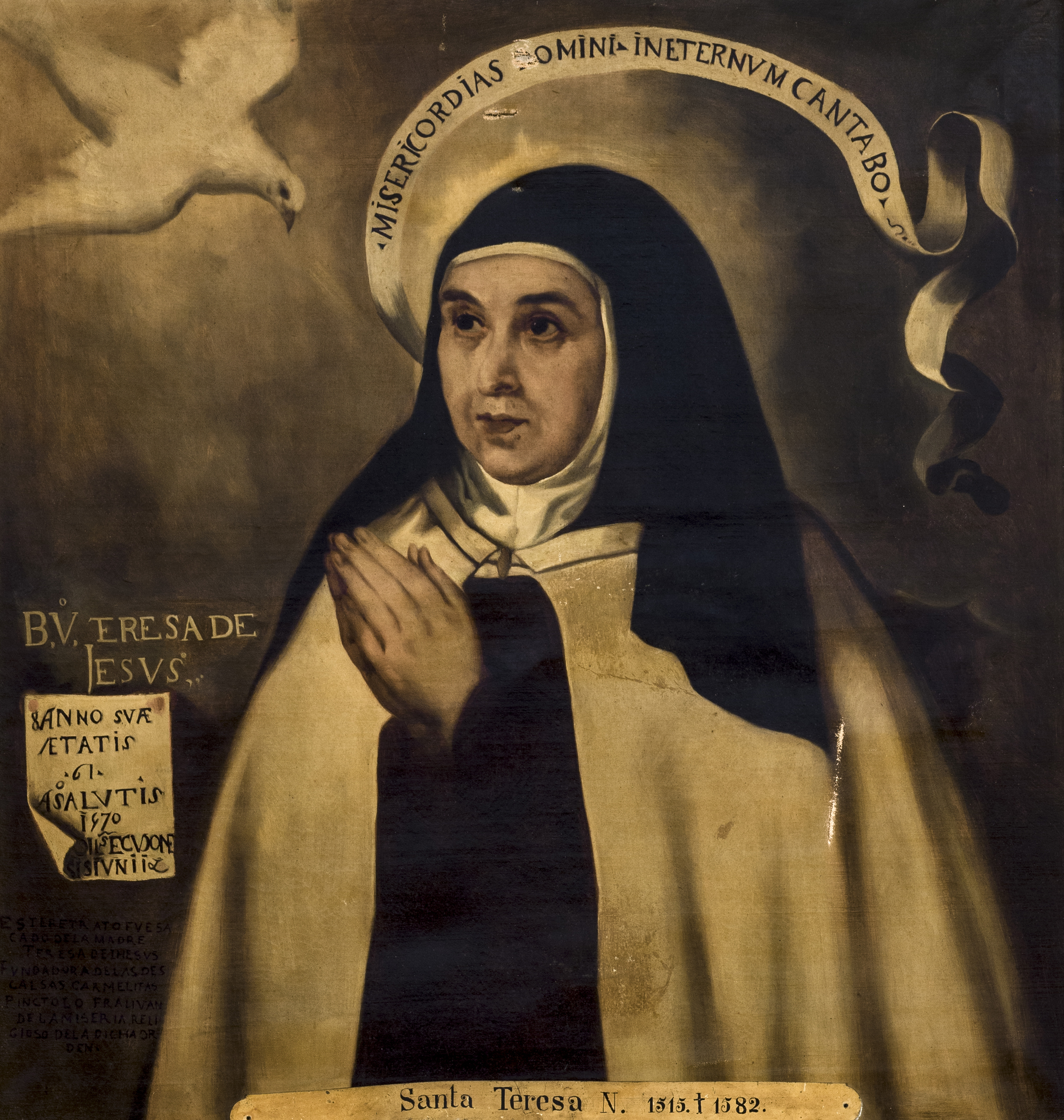 Retrato de la mística española Santa Teresa de Jesús (1515-1582). Esta obra es una copia decimonónica del retrato de la santa que pintó fray Juan de la Miseria en el siglo XVI.